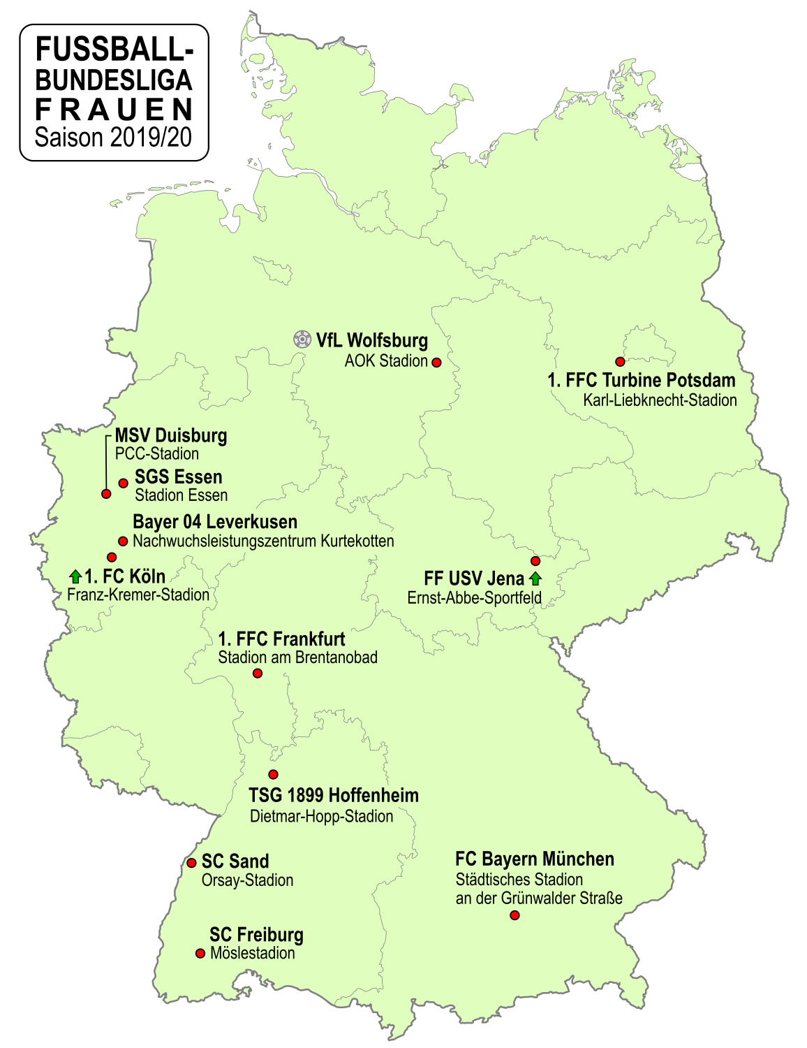 Karte der Vereine der Frauen Fußball-Bundesliga-Saison 2019/2020